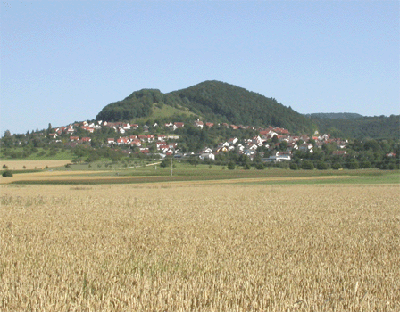 Blick auf die Gemeinde Aichelberg. Dahinter liegen zwei Berge: der kleinere, der "Aichelberg", der größere der "Turmberg" dahinter. Dies sind zwei Vulkankegel des Typs "Schwäbischer Vulkan" des Urach-Kirchheimer Vulkangebiets, die im Ober-Miozän zwischen 17 und 11 Mill. Jahren aktiv waren. In der nahen Umgebung wurden 3 weitere, kleine Vulkane des gleichen Typs geologisch nachgewiesen.